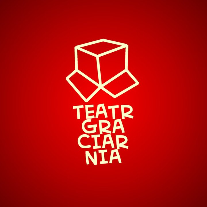 Logo Teatru Graciarnia autorstwa Edyty Żmudzkiej